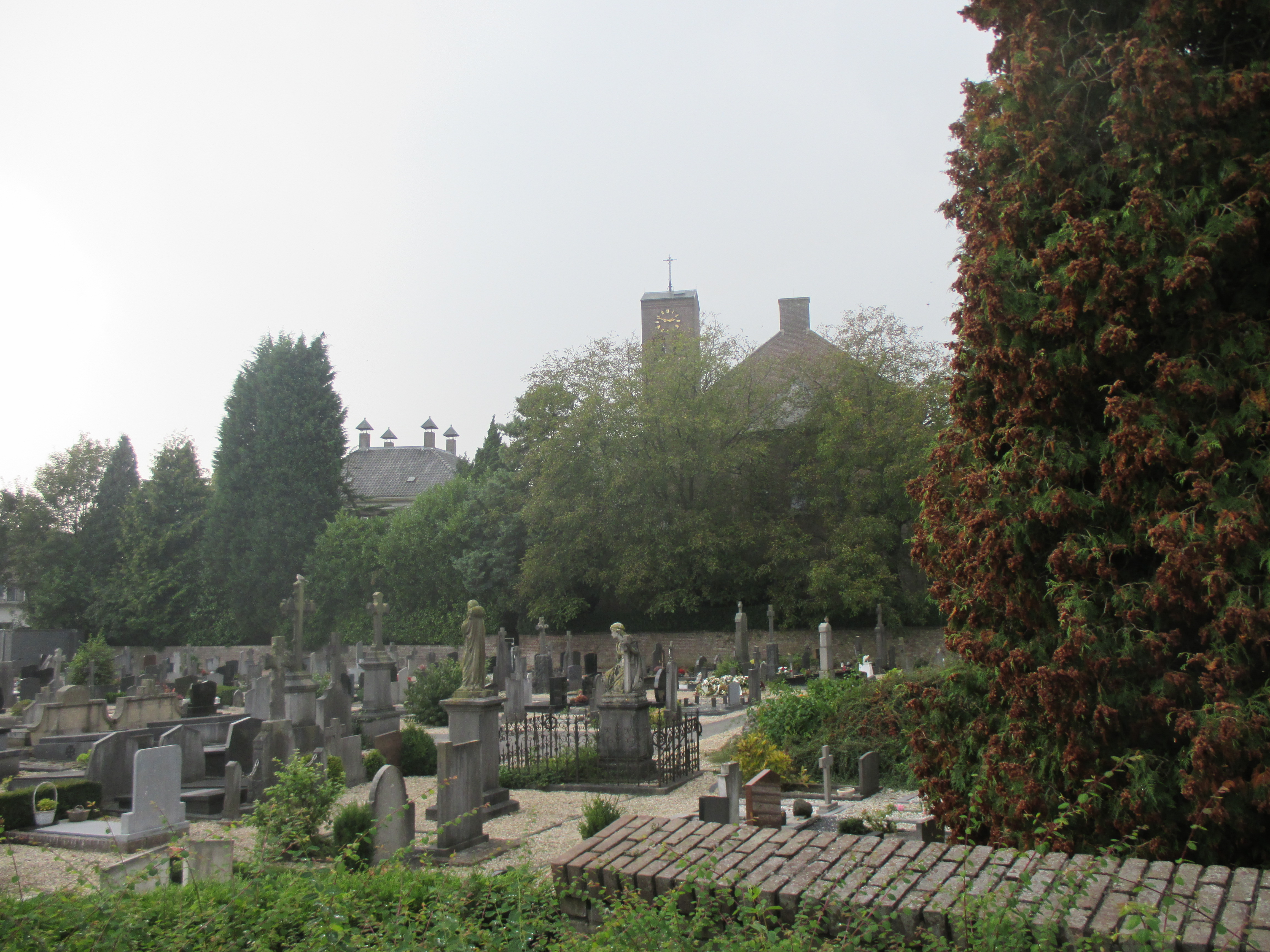 Kerkhof bij de Rooms-katholieke Sint-Victorkerk te Wamel